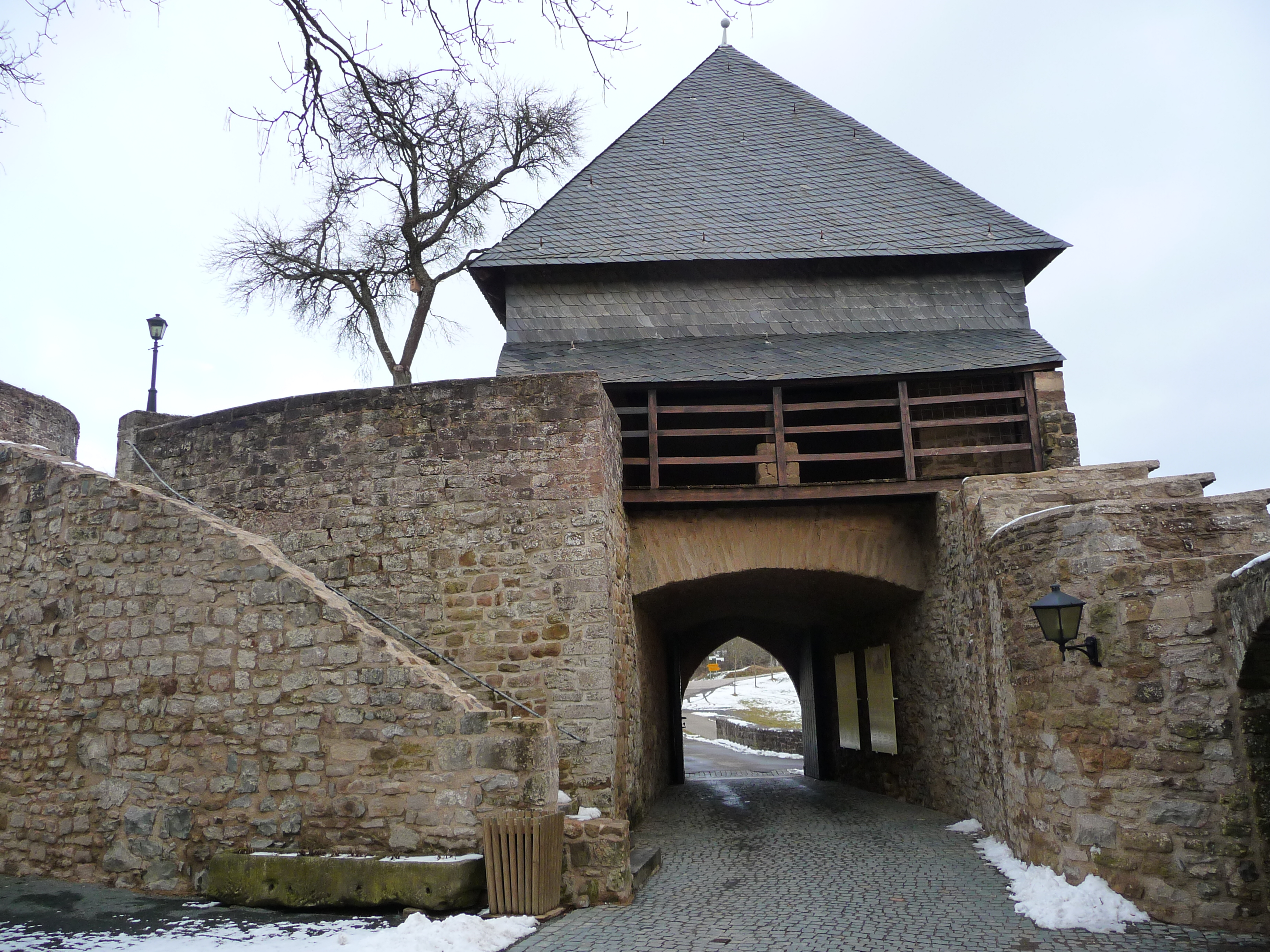 Blick auf das Erste Tor der Burg Lichtenberg von Westen (Landkreis Kusel, Rheinland-Pfalz, Deutschland)